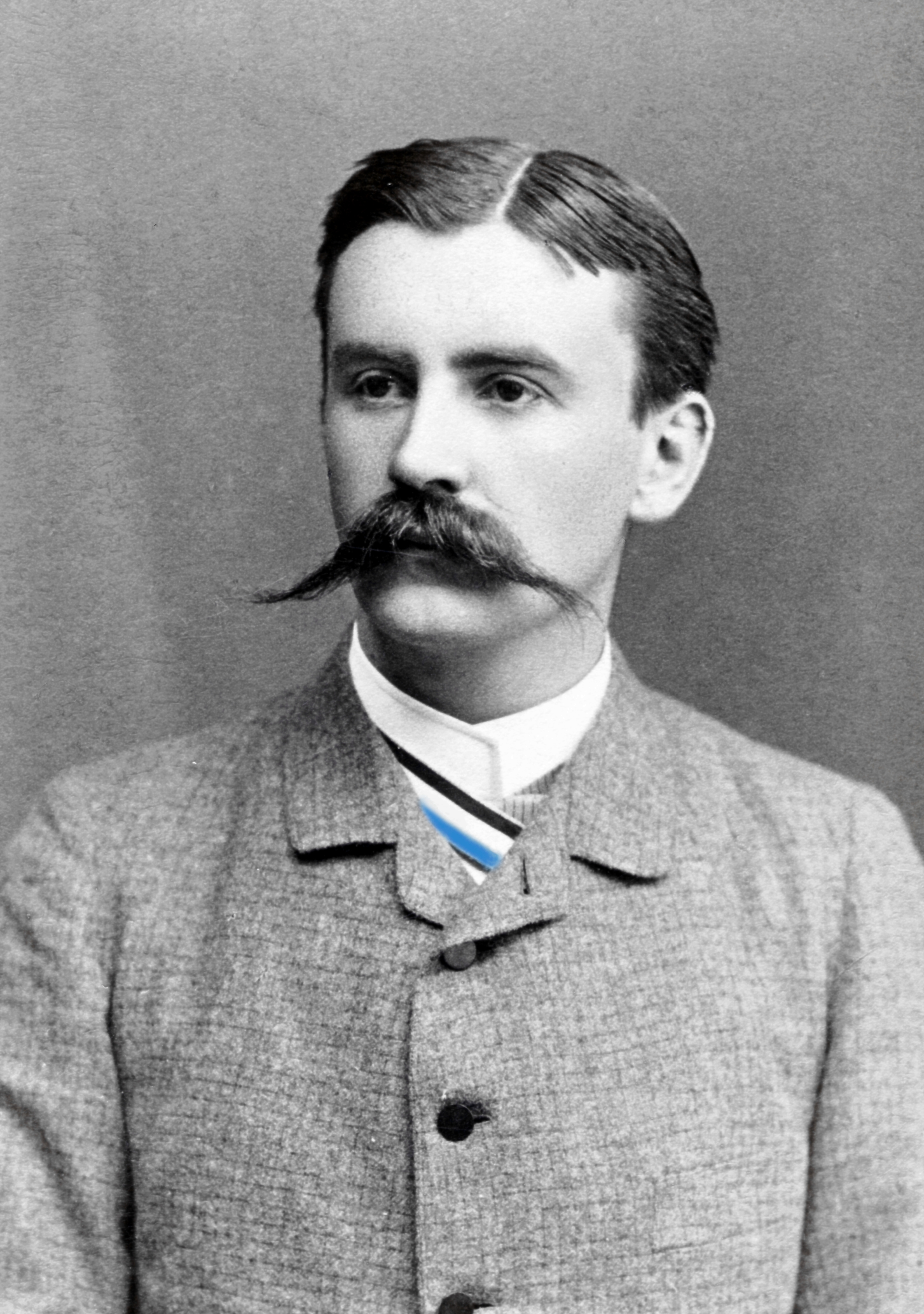 Porträtfotografie des Gynäkologen und Geburtshelfers Walter Rüder (1861–1922)